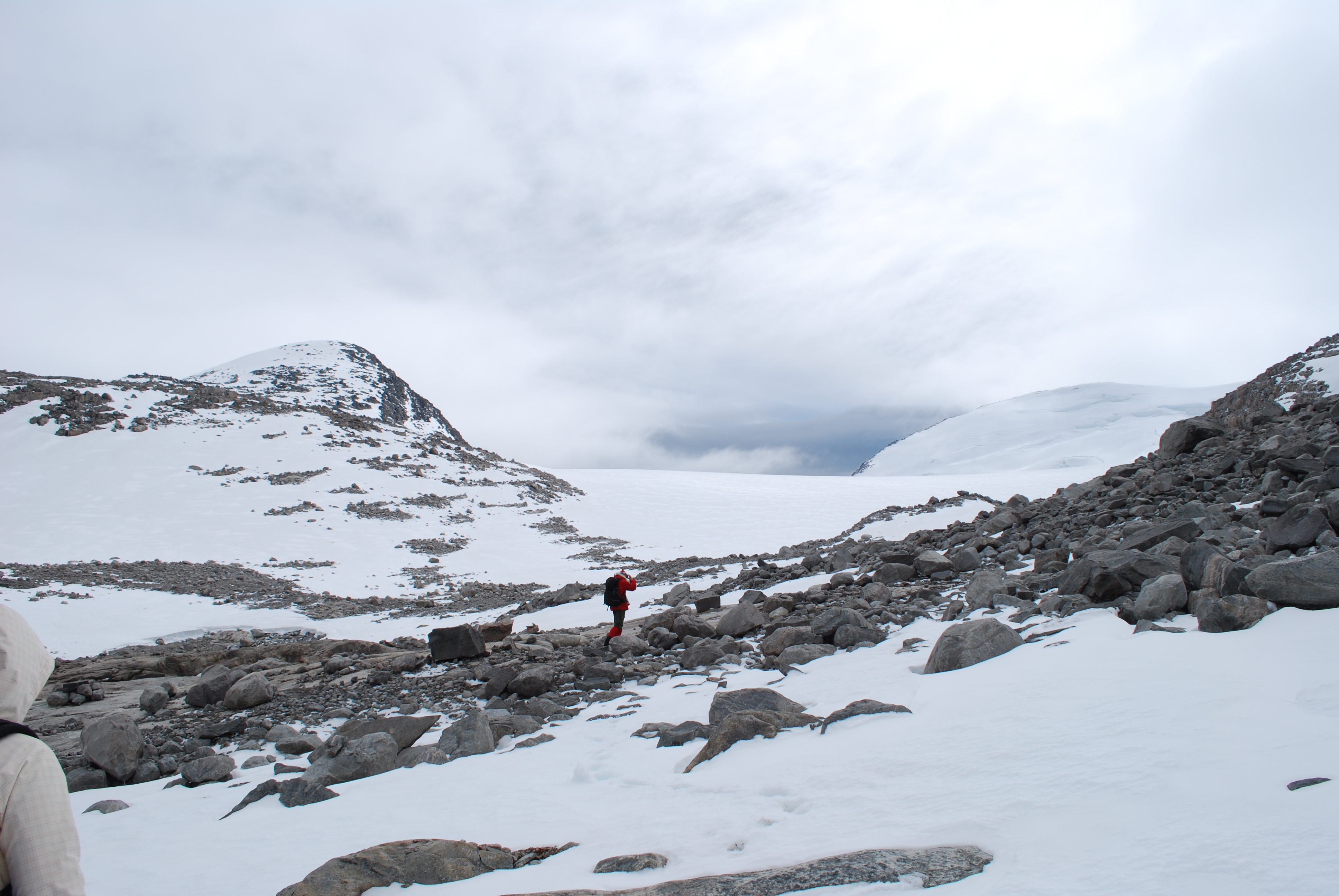 Sveinkollen til venstre og Fortundalsbreen i bakgrunnen til høyre/midt på bildet.